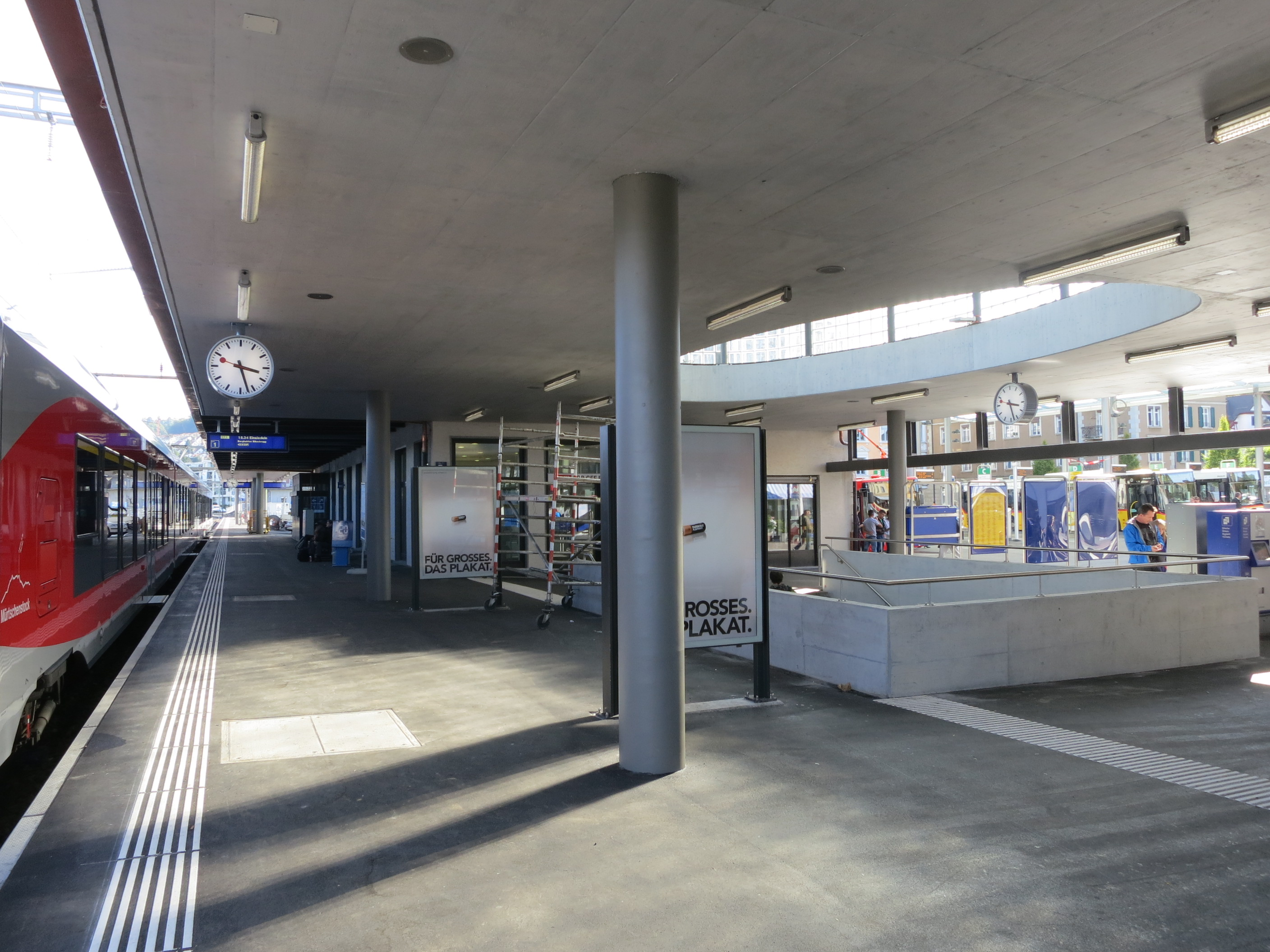 Bahnhof Wädenswil ZH, Schweiz